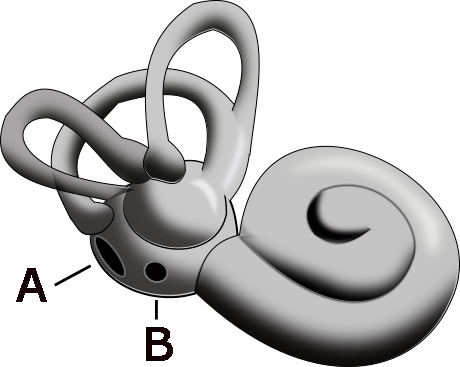 Representación del oído interno en la que se indica la posición del la ventana oval (A) y ventana redonda (B)